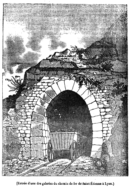 dessin